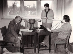 Die Anfänge der Telefonseelsorge in Berlin.